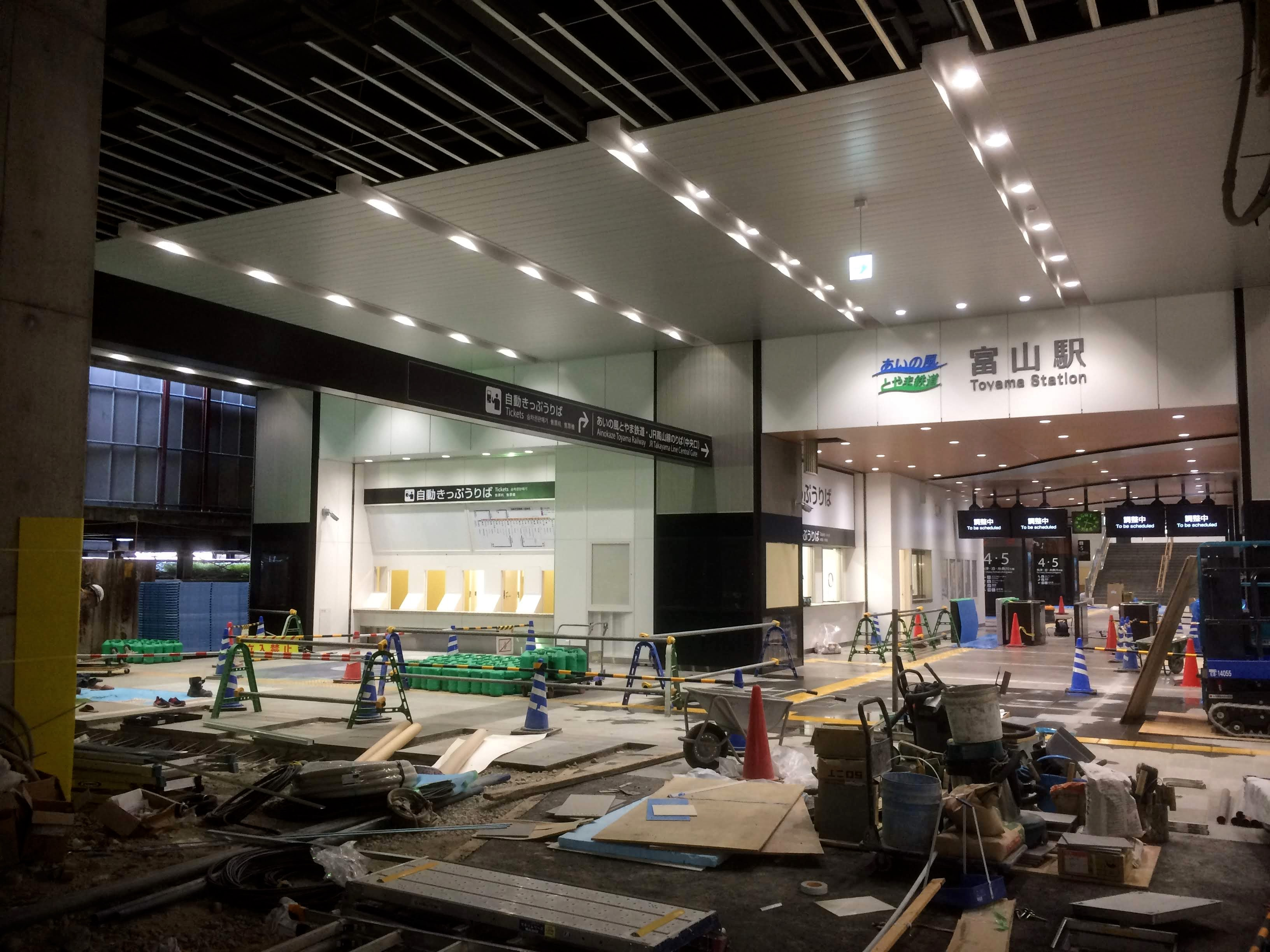 あいの風とやま鉄道 富山駅の新入口（自動券売機・窓口など）